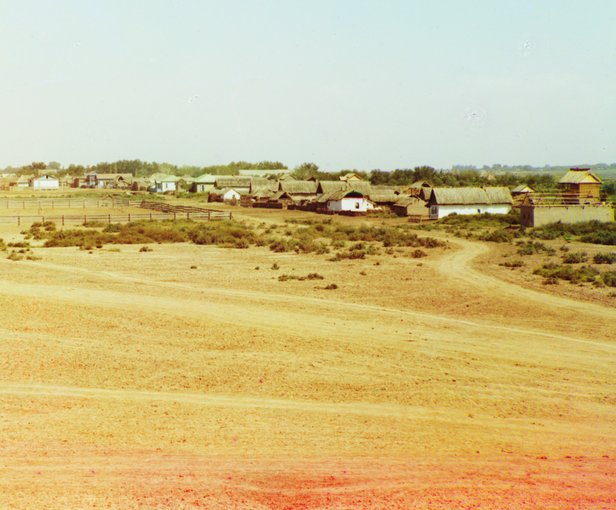 Sabirabad (Petropavlovka).